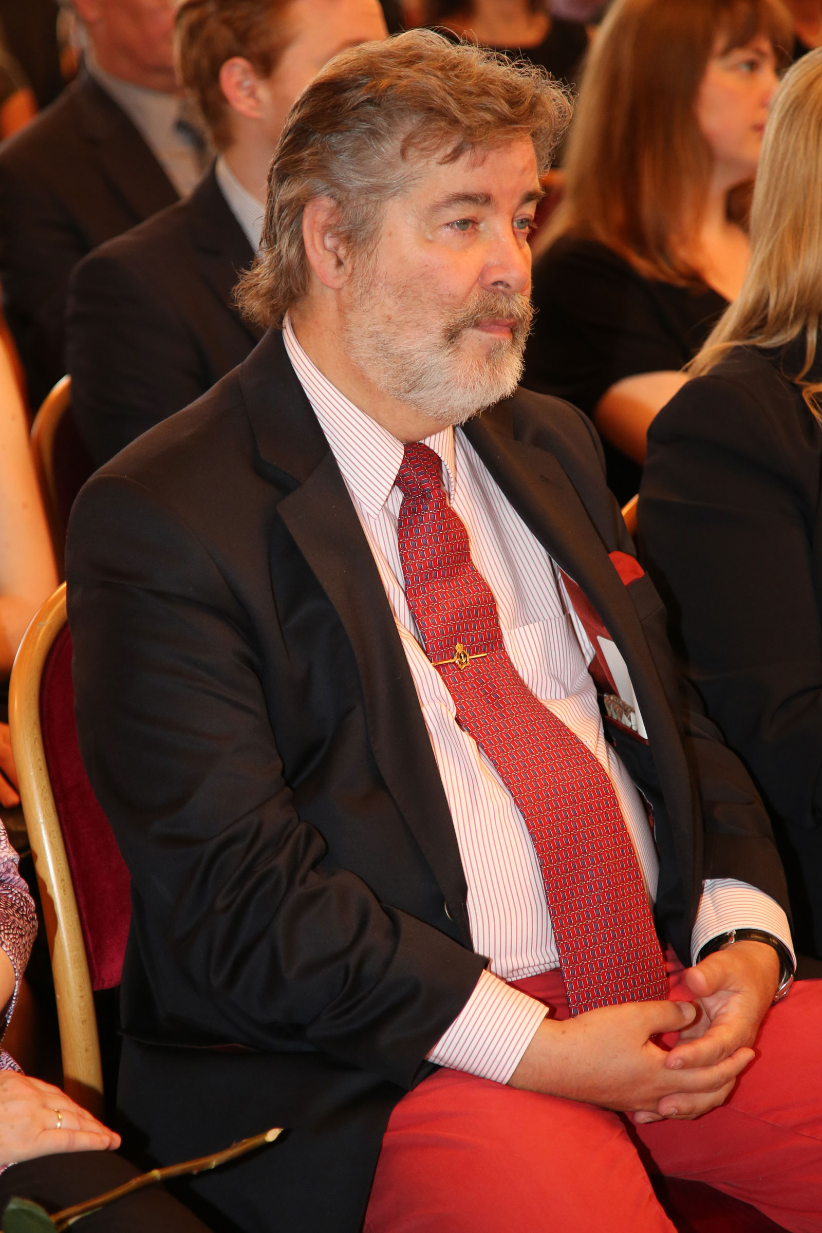 Univ.-Prof. Dr. Peter Vitouch, Institut für Publizistik- und Kommunikationswissenschaft